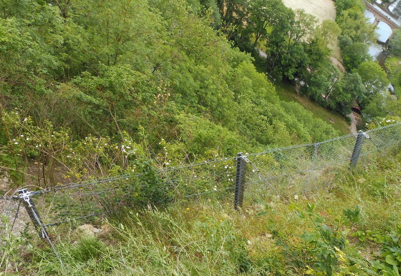 Fangzaun an der Felskante der Rudelsburg (oben rechts die Eisenbahn- und Straßenbrücken über die Saale.